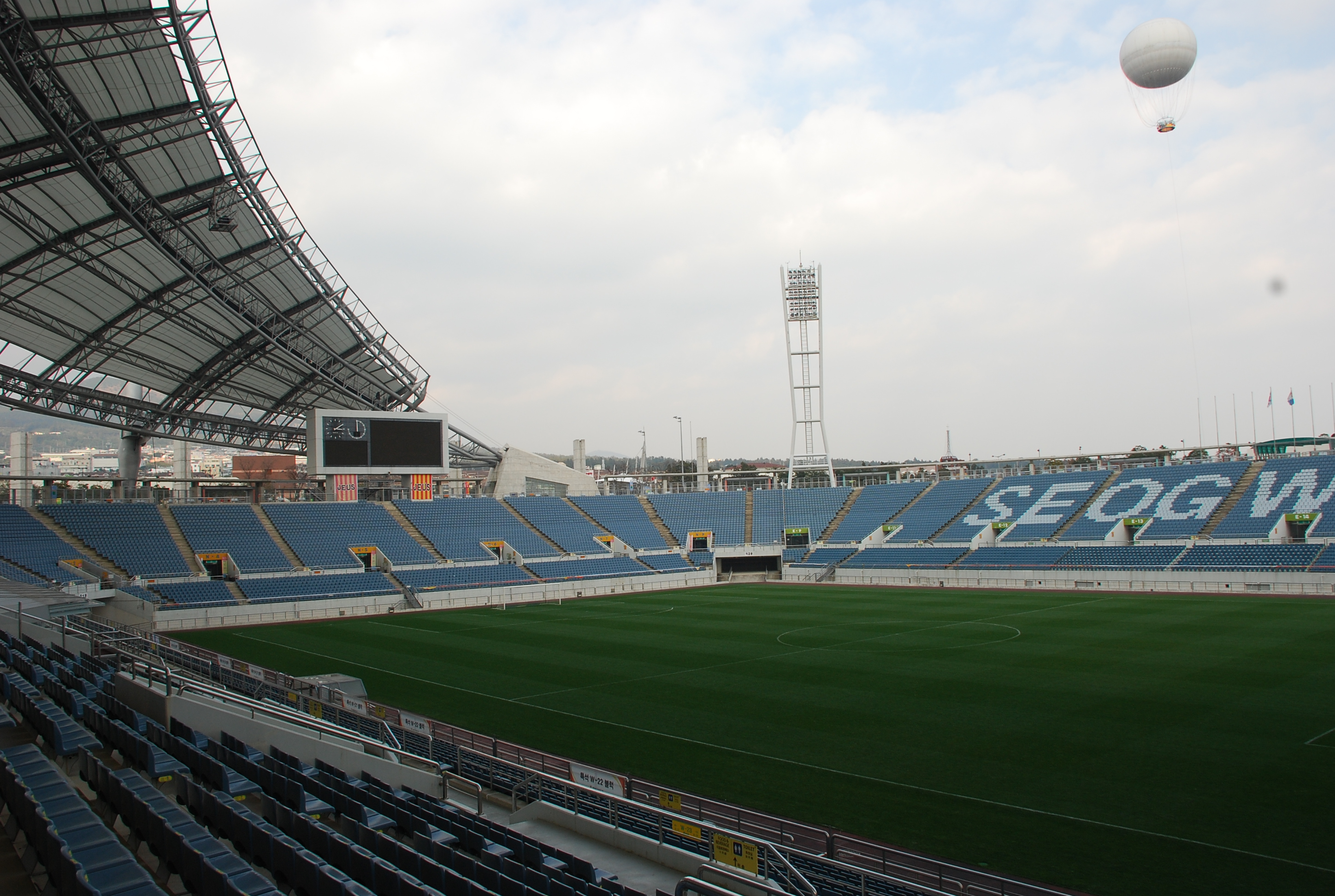 2007 Chejudao Korea